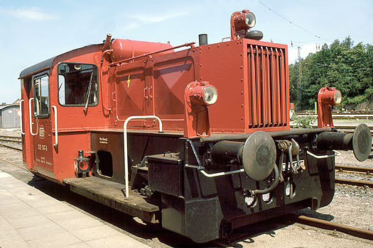 DB 323 114 2.8.1984 in Lüneburg